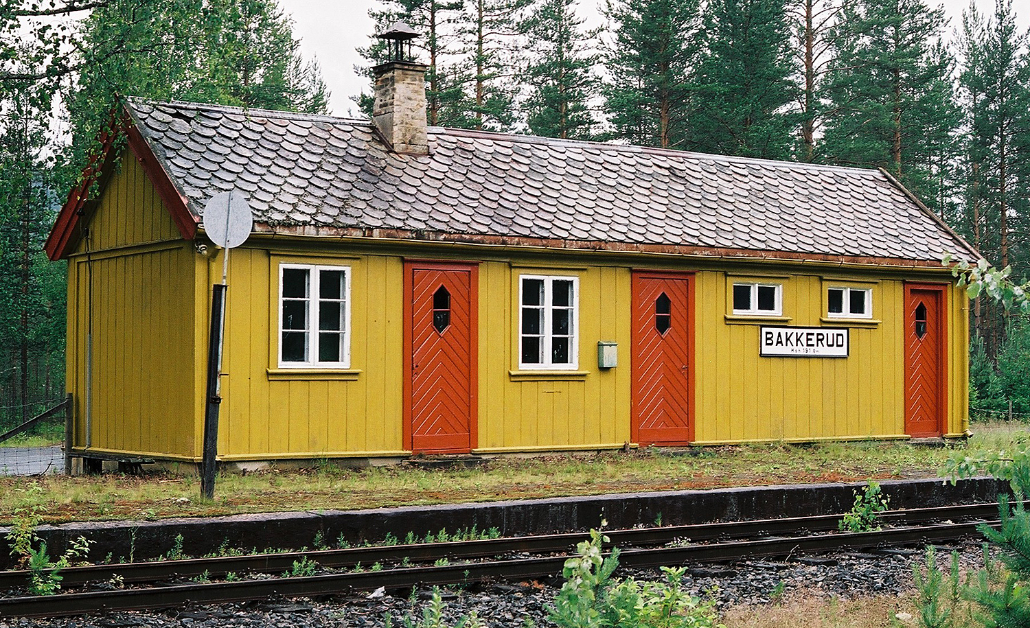 Bakkerud stasjon, Numedalsbanen.